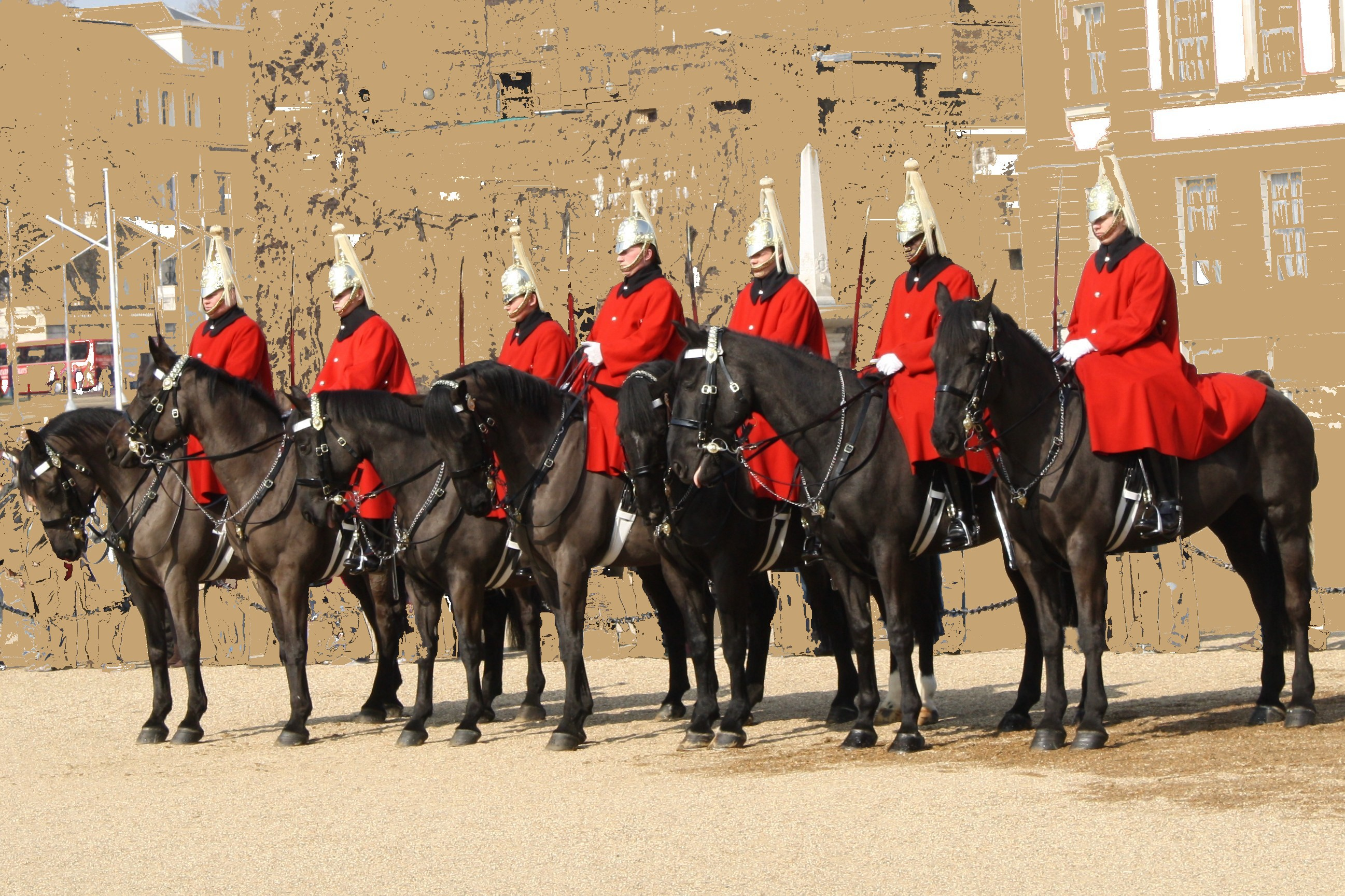 Horse Guards - Régiment des Life Guards, en tunique rouge. Horse Guards Building : relève de la Garde (changement de régiment en faction à Whitehall). Londres